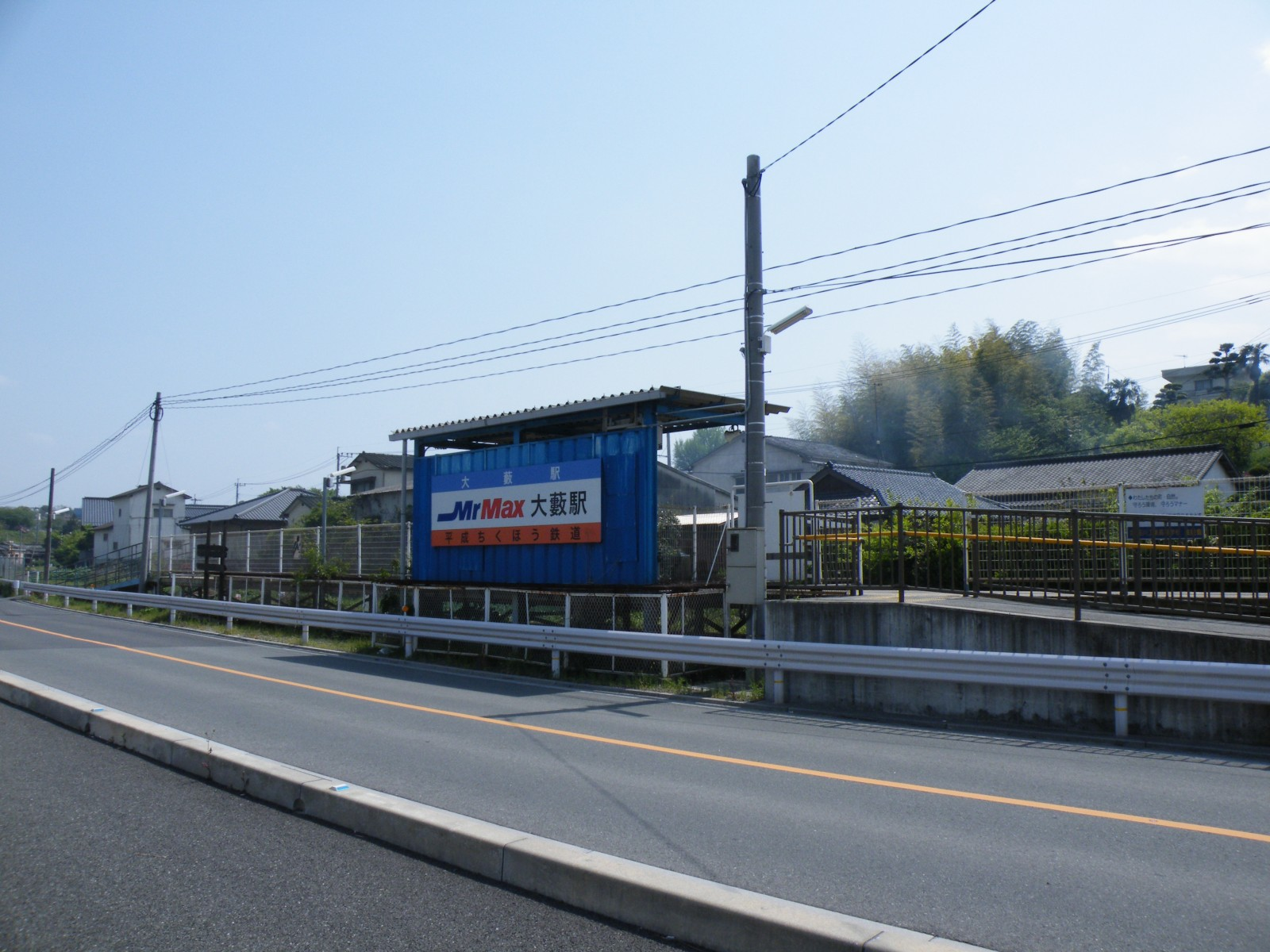 平成筑豊鉄道糸田線大藪駅